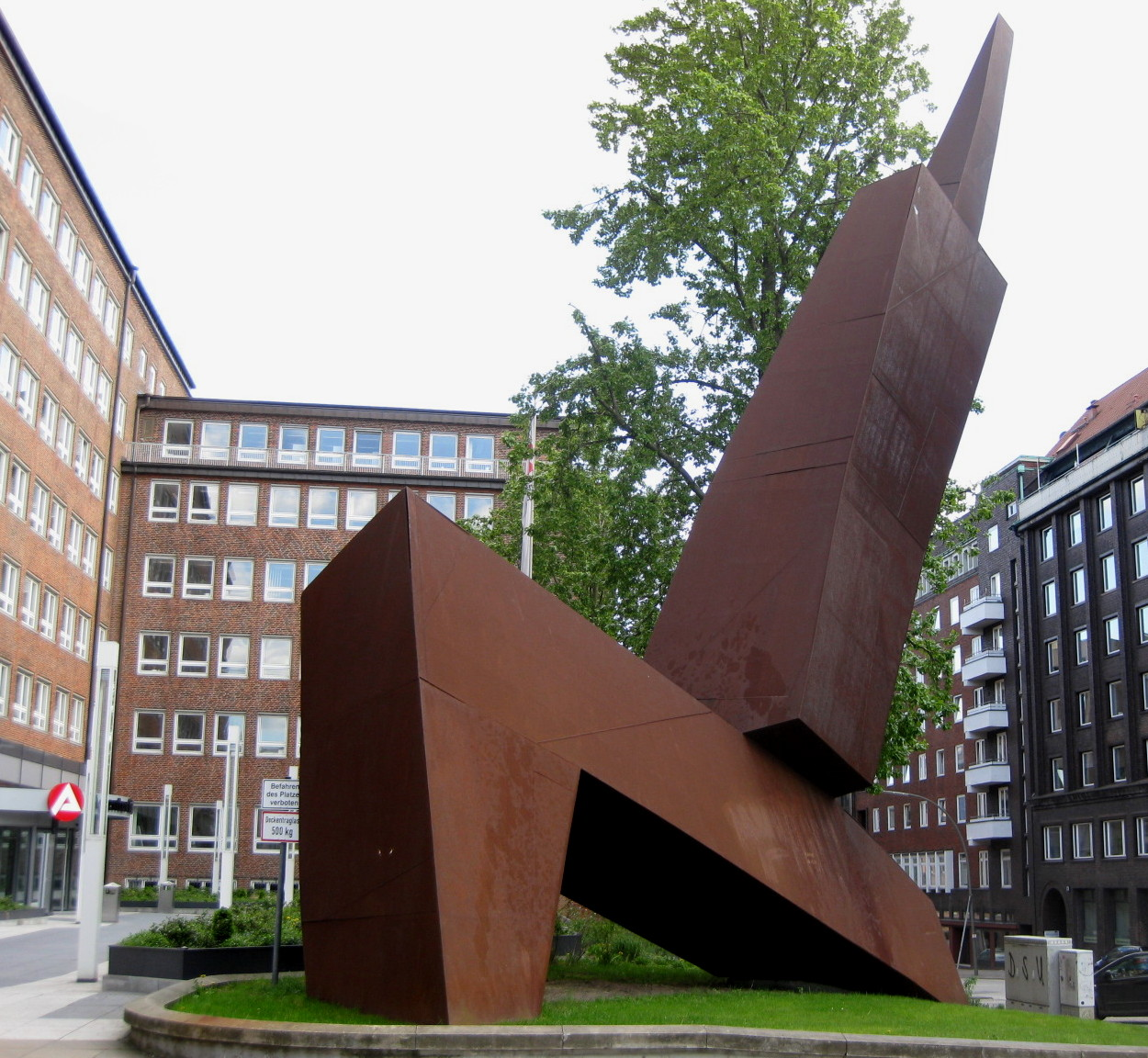 Skulptur "Hamburger Form" (1991/1997) von Franz Bernhard in Hamburg, vor der Agentur für Arbeit, Kurt-Schumacher-Allee/Nagelsweg